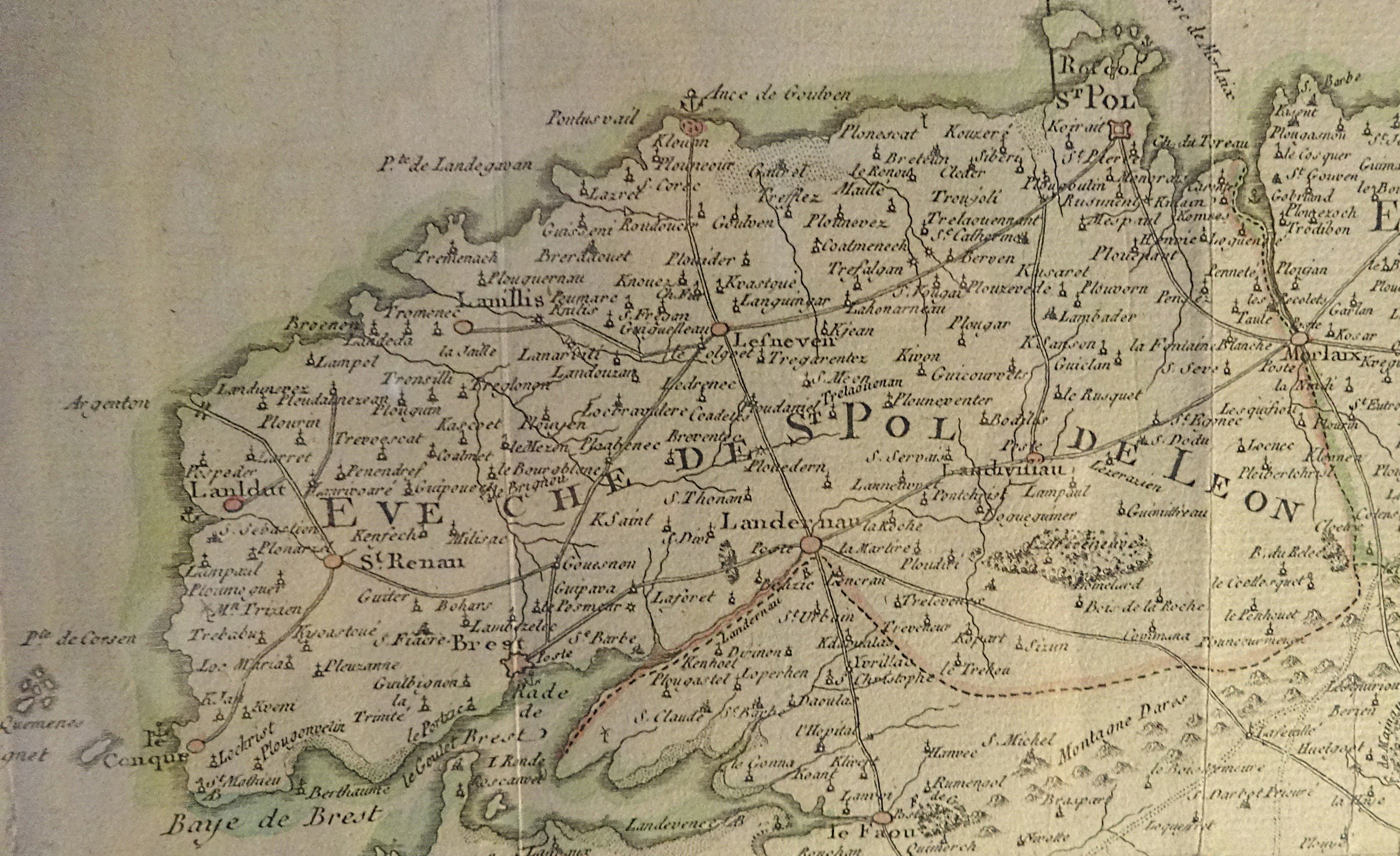 Carte de l'évêché de Léon. Extrait de la "Carte générale de la province de Bretagne. Levée géométriquement et assujetie aux observations astronomiques de Mrs de l'Académie Royale des Sciences. Dédiée à Nos Seigneurs les Etats de Bretagne/ Par une Société d'Ingénieurs", 1775.